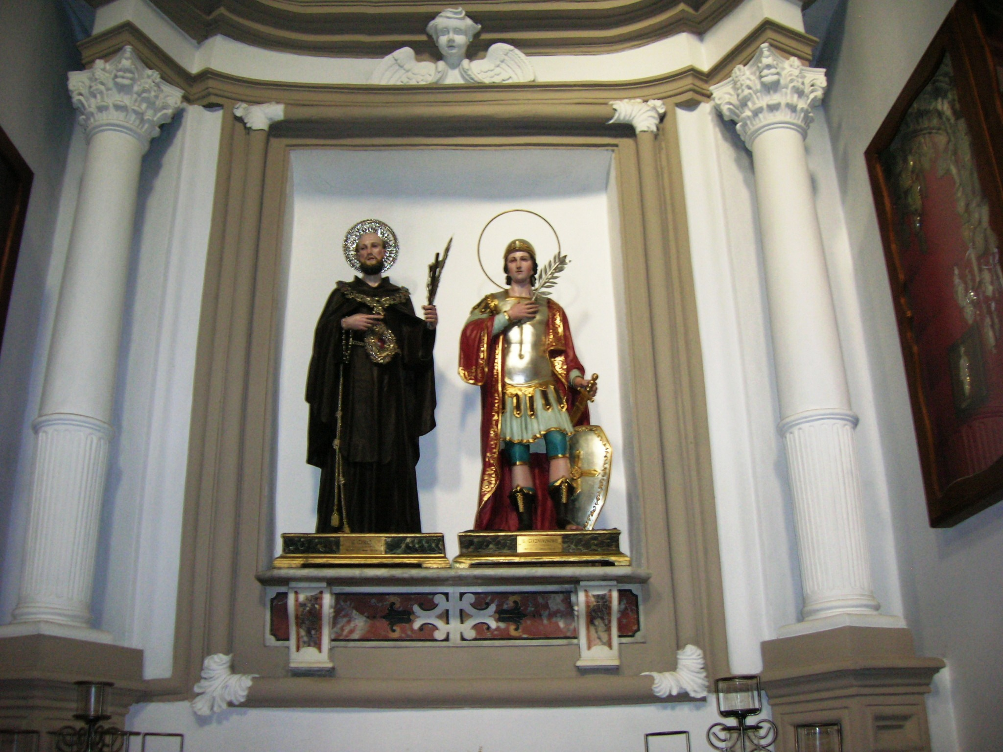 La chiesa di Santi Ciro e Giovanni a Vico Equense